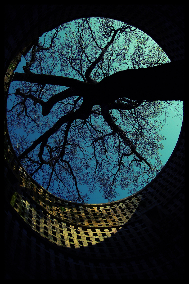 Au fin fond des Deux-Sèvres fut bâti un pigeonnier. Laissé ensuite à l'abandon, le temps lui fit perdre son toit. Le hasard y fit pousser un chêne auquel personne ne prêta attention. L'arbre étant à son aise, il poussa jusqu'à dépasser le pigeonnier, coiffant celui-ci de sa belle chevelure, et faisant de ce lieu un site unique. Alliance du végétal et du minéral, le chêne de Pouzay, classé parmi les 250 "arbres remarquables" de l'hexagone, mérite assurément le détour. De plus, les chemins de randonnée qui le bordent permettront aux marcheurs de découvrir cette région au cachet rural authentique.